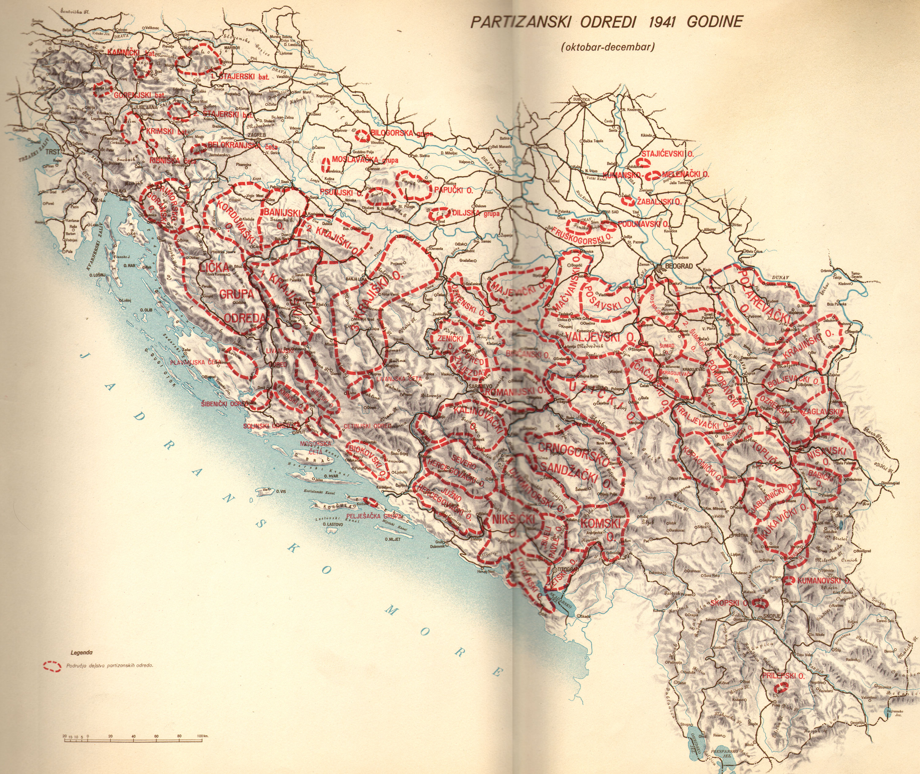 Srpskohrvatski / српскохрватски: Partizanski odredi 1941 godine (oktobar-decembar 1941). [Partisan detachments in October to December 1941]